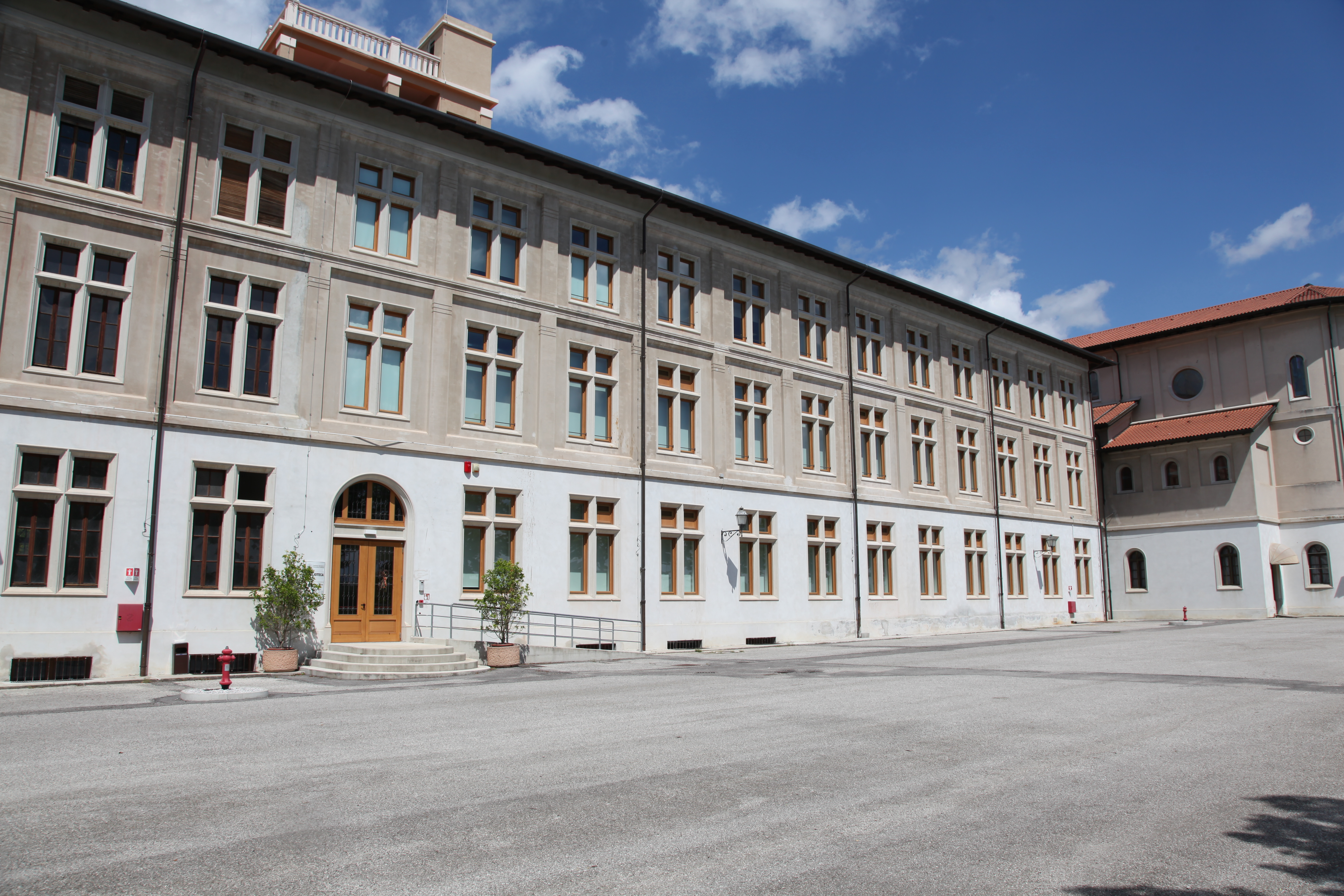 Biblioteca del Seminario di Pordenone, esterno lato sud, Ingresso principale